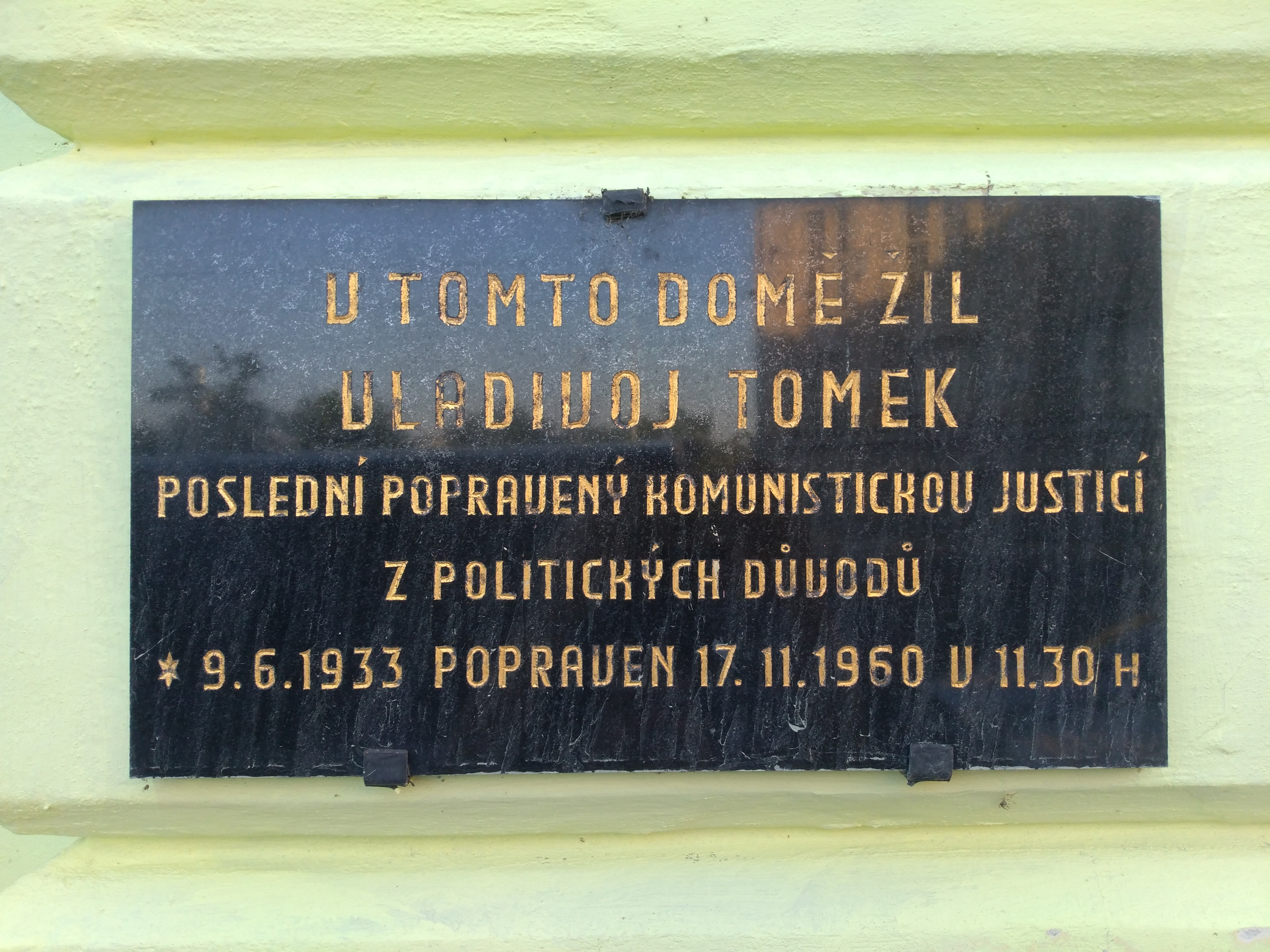 Pamětní deska připomínající popraveného Vladivoje Tomka, Dukelských hrdinů 349/15, Praha.